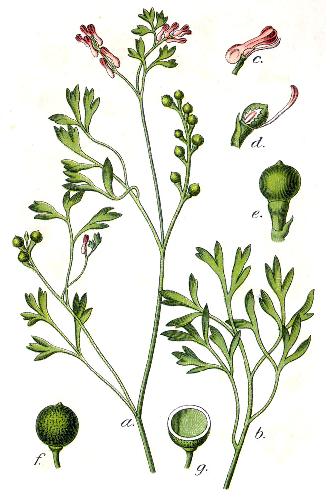 Fumaria vaillantii Loisel. s. l. Original Caption Valiant-Erdrauch, Fumaria vaillantii